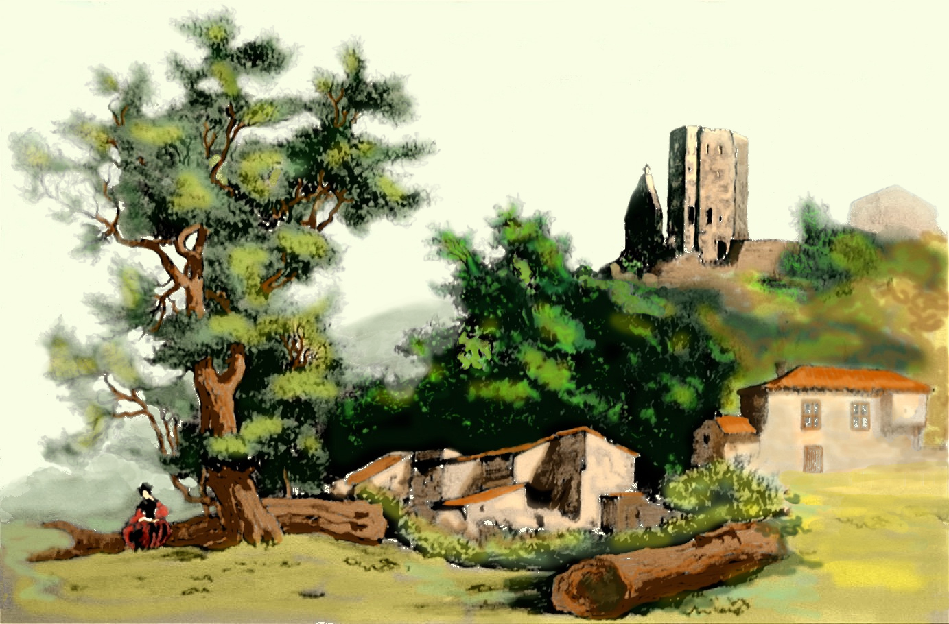 Dessin de J. D'Auriol, représentant le village de Vals, en Ariège, en janvier 1860. Mis en couleur